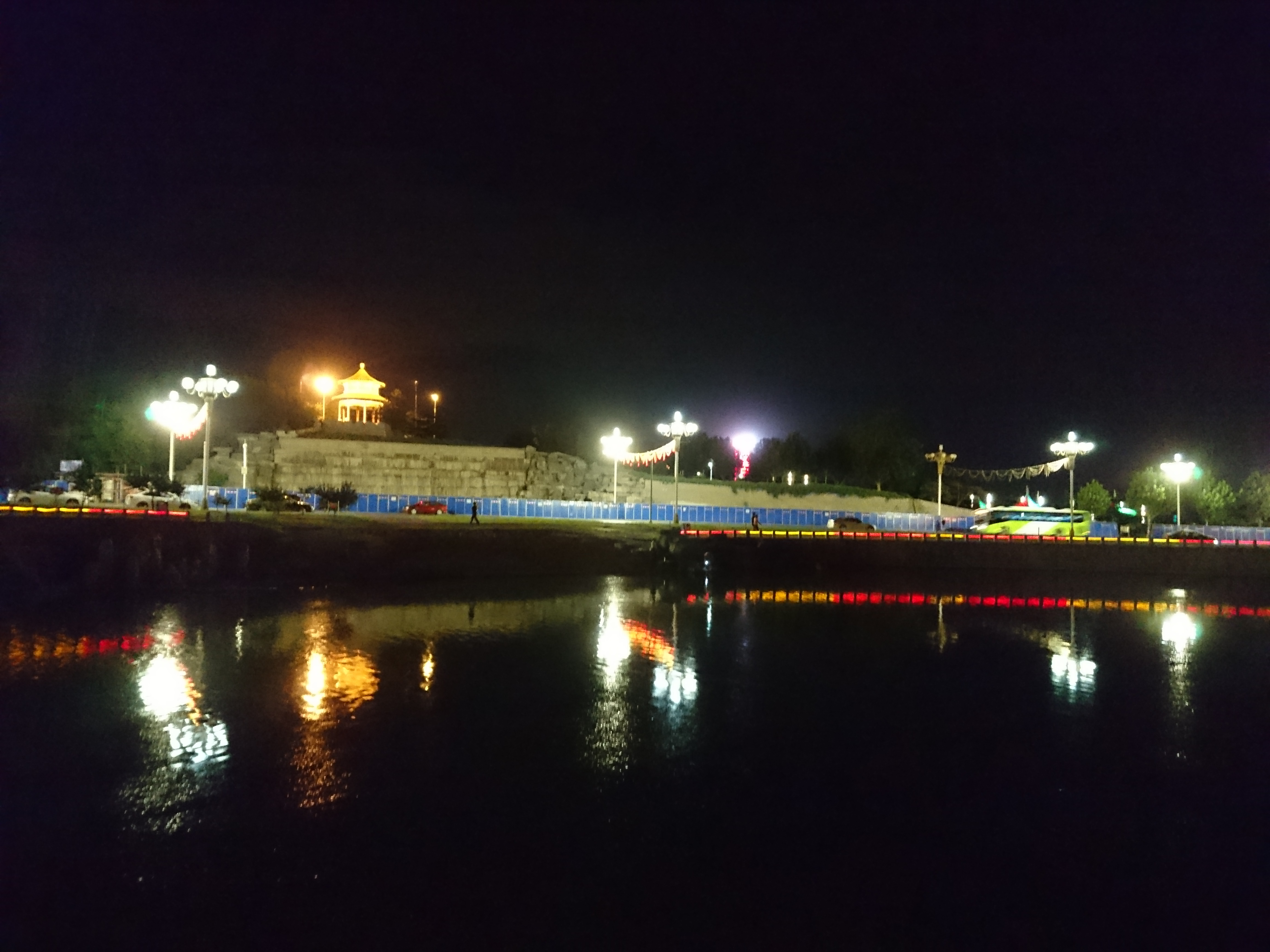 夜の燕山迎風街道